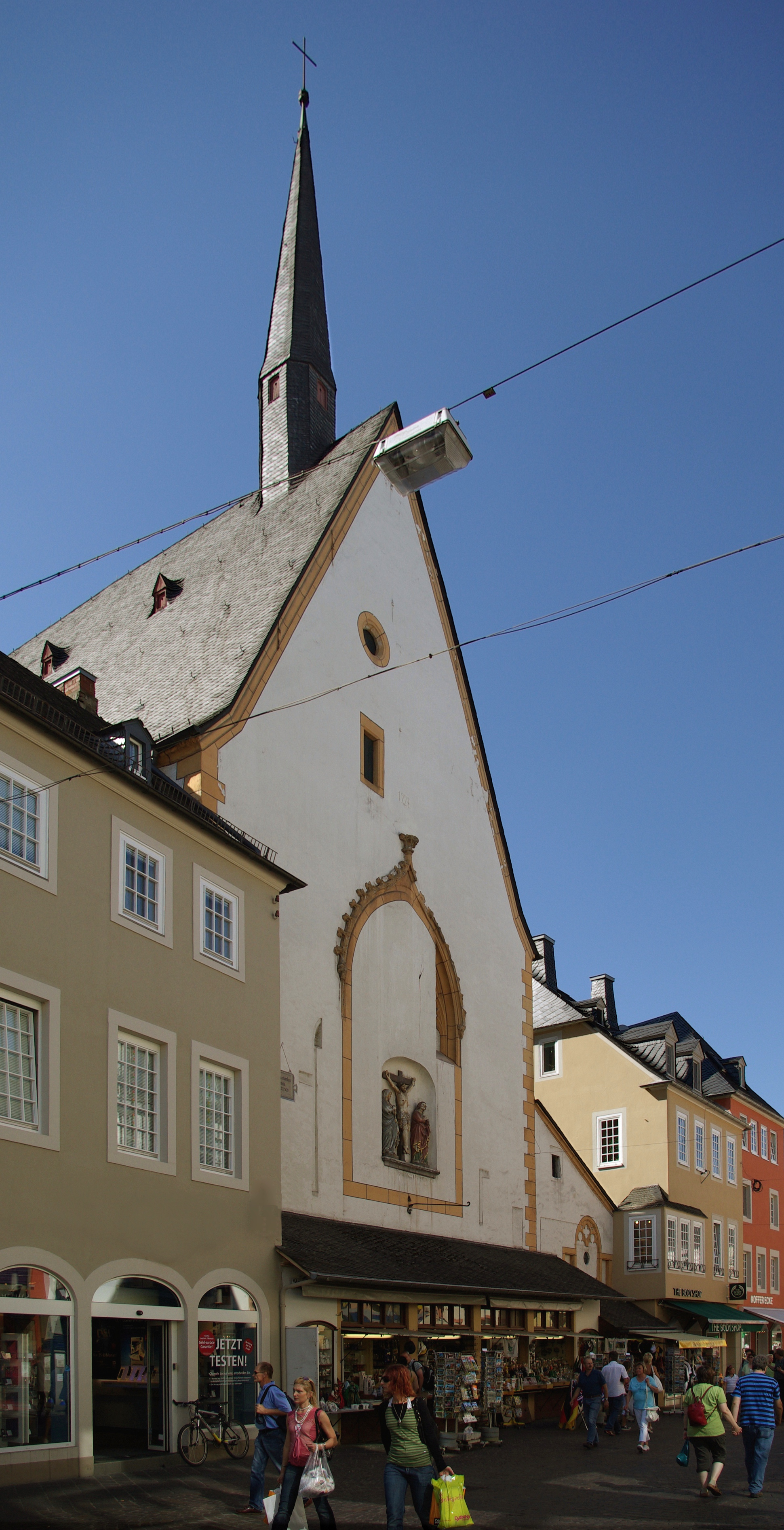 Trier, Sankt Gangolf, Ostseite mit Souvenirläden, "Gädemcher" genannt